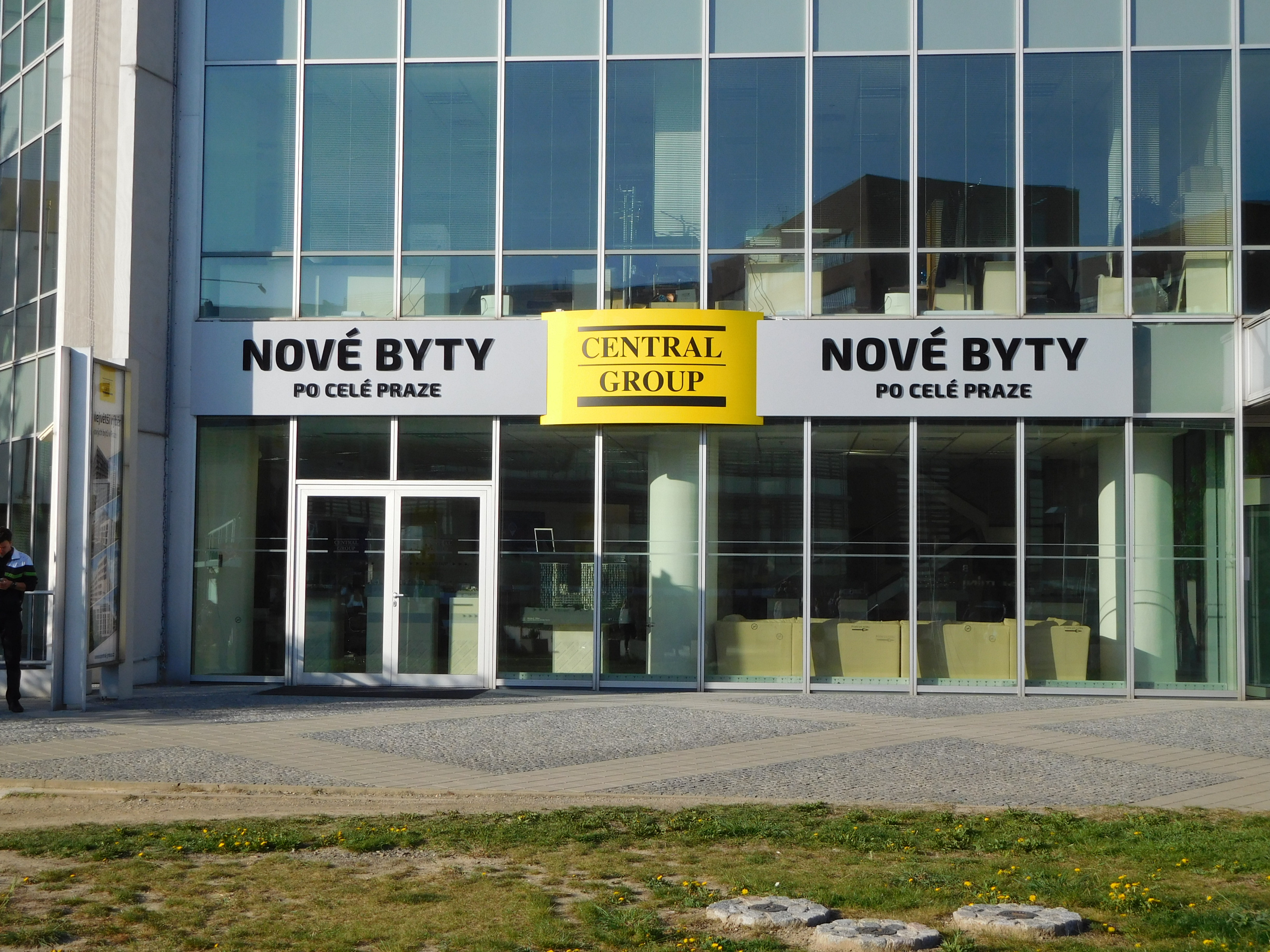 Praha - Pankrác, Na strži 65, Central Group